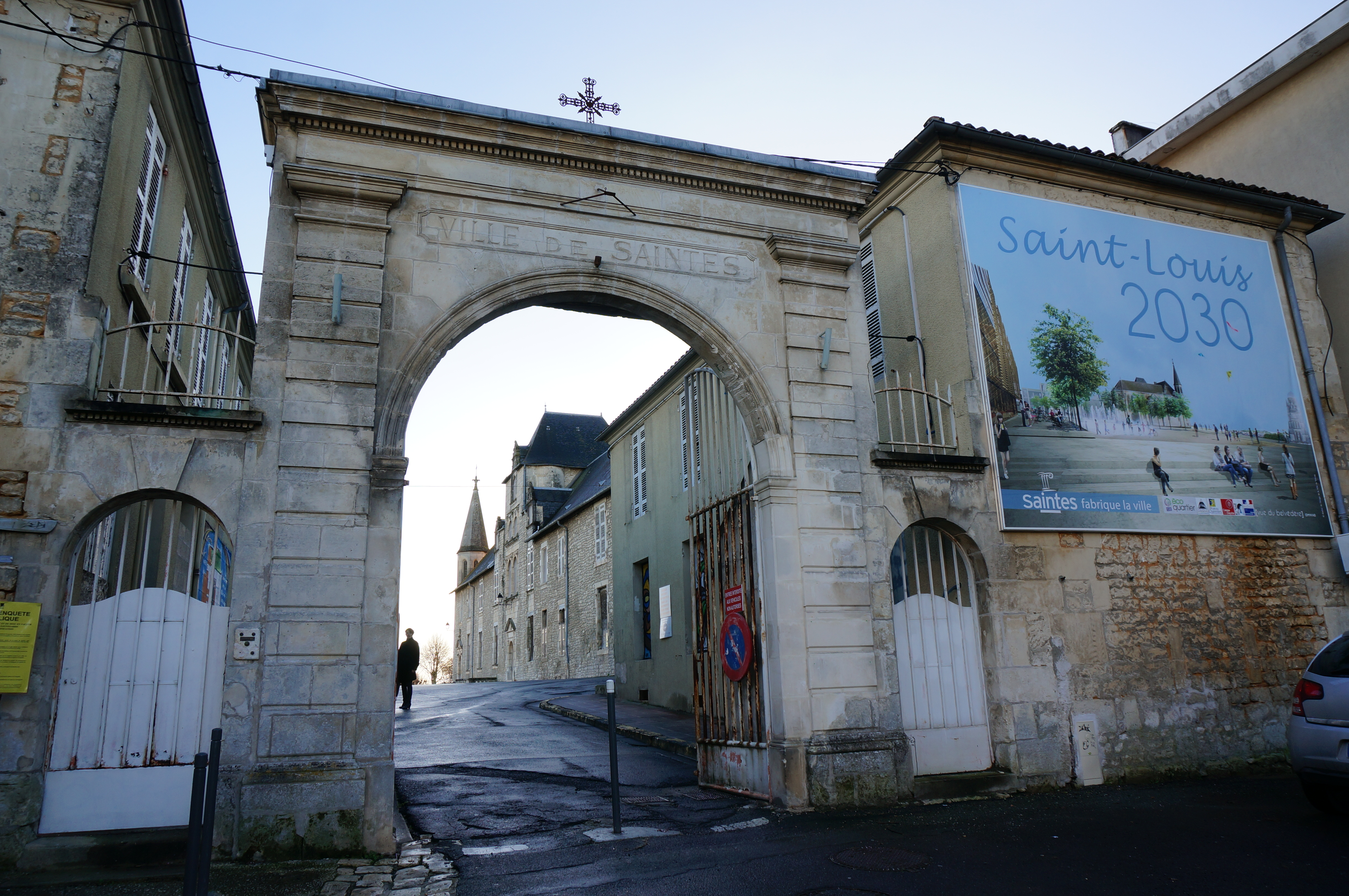 A Saintes.